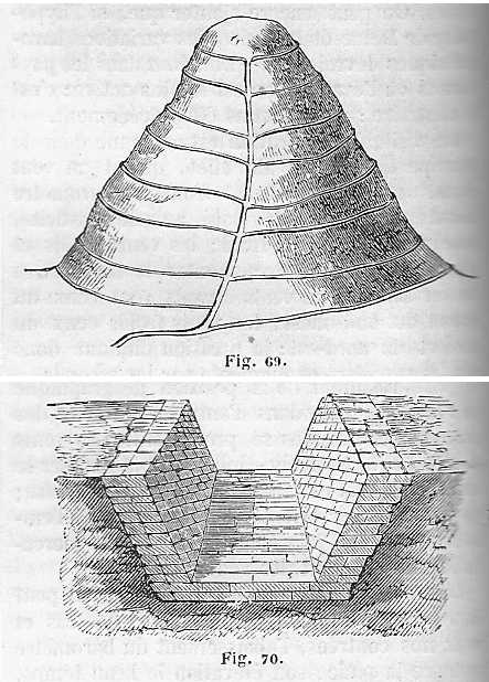 Schéma de barradines sur un flanc de montagne & détail de la construction